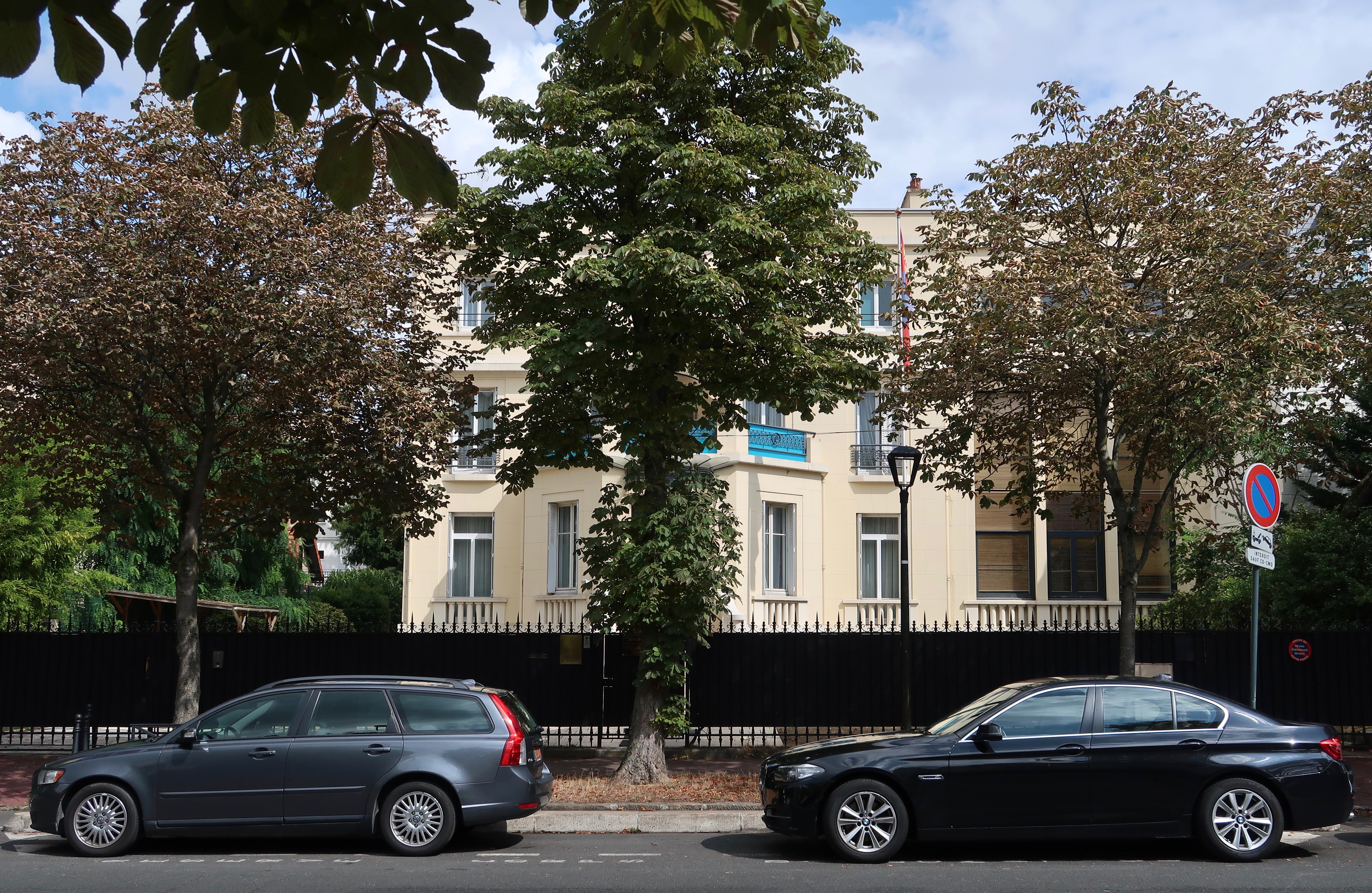 Ambassade de Mongolie en France, 5 avenue Robert-Schuman à Boulogne-Billancourt (Hauts-de-Seine).